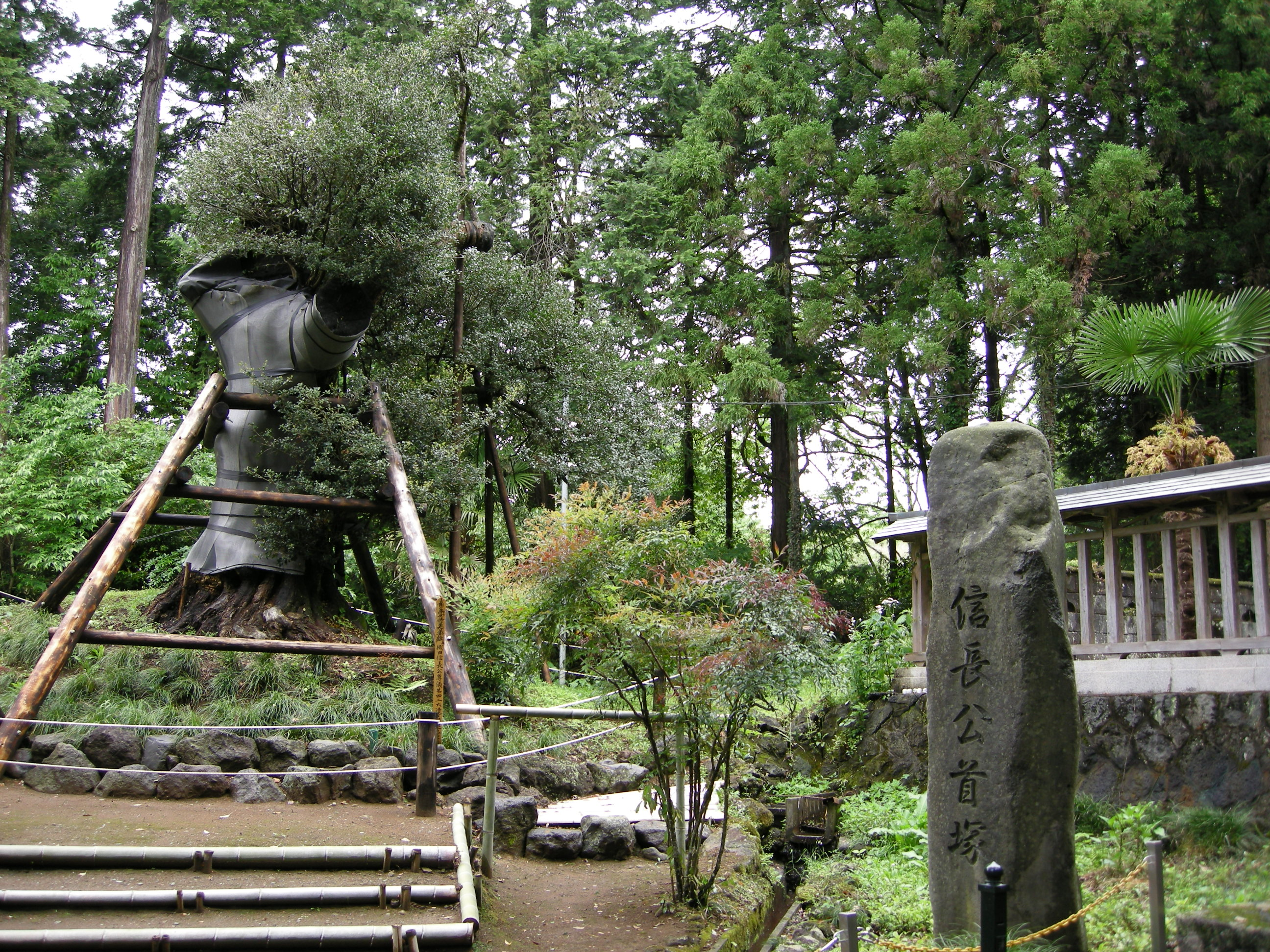 Nishiyamahonmonji at shibakawa-cho fuji-gun shizuoka-pref